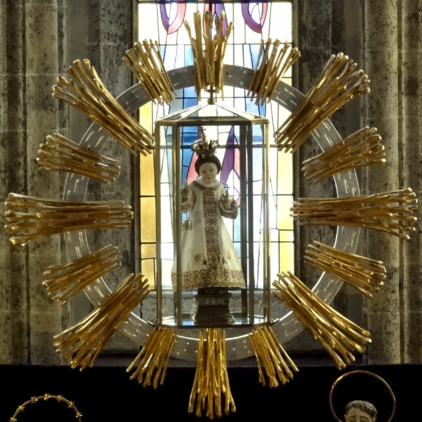 Saints Peter and Paul Church (Filzmoos) Filzmooser Kindl